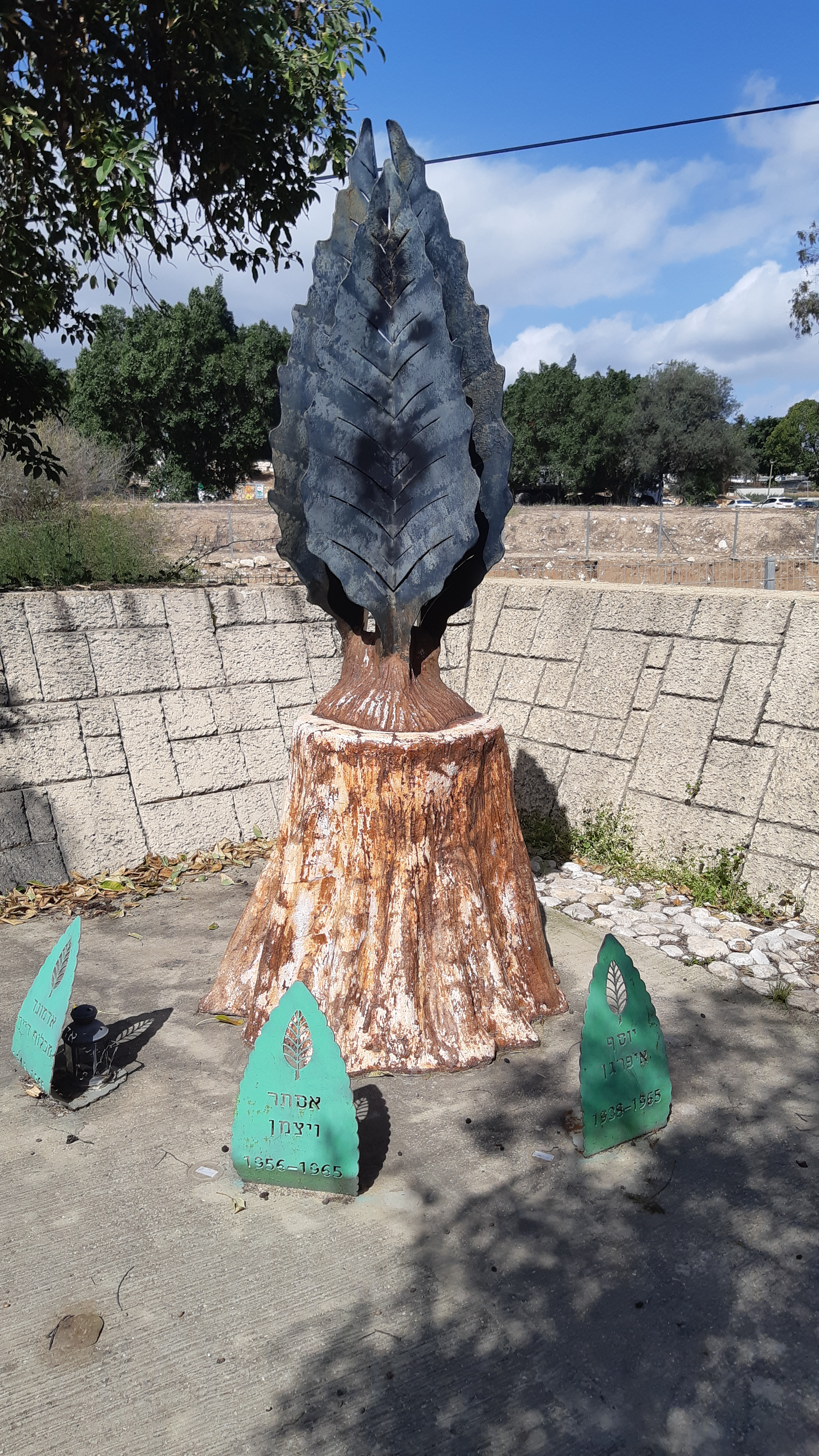 פינת הזכרון לייד גשר השלושה - קרית גת